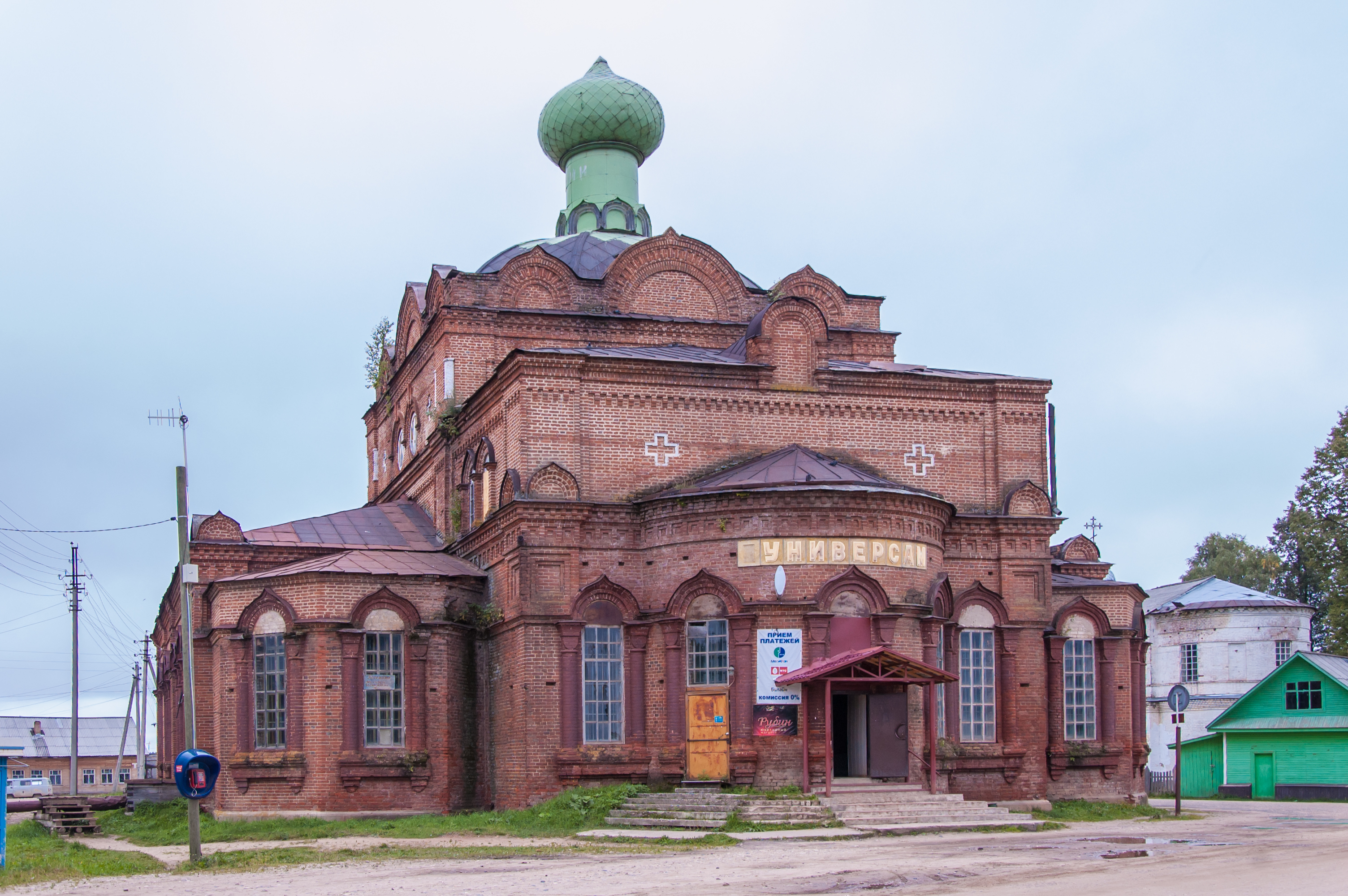 Церковь: Боговарово, Октябрьский район, Костромская область